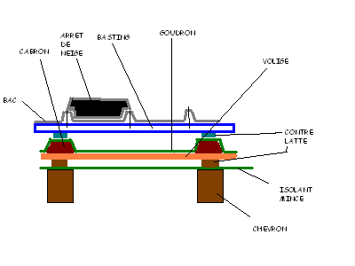 By Cedric S.